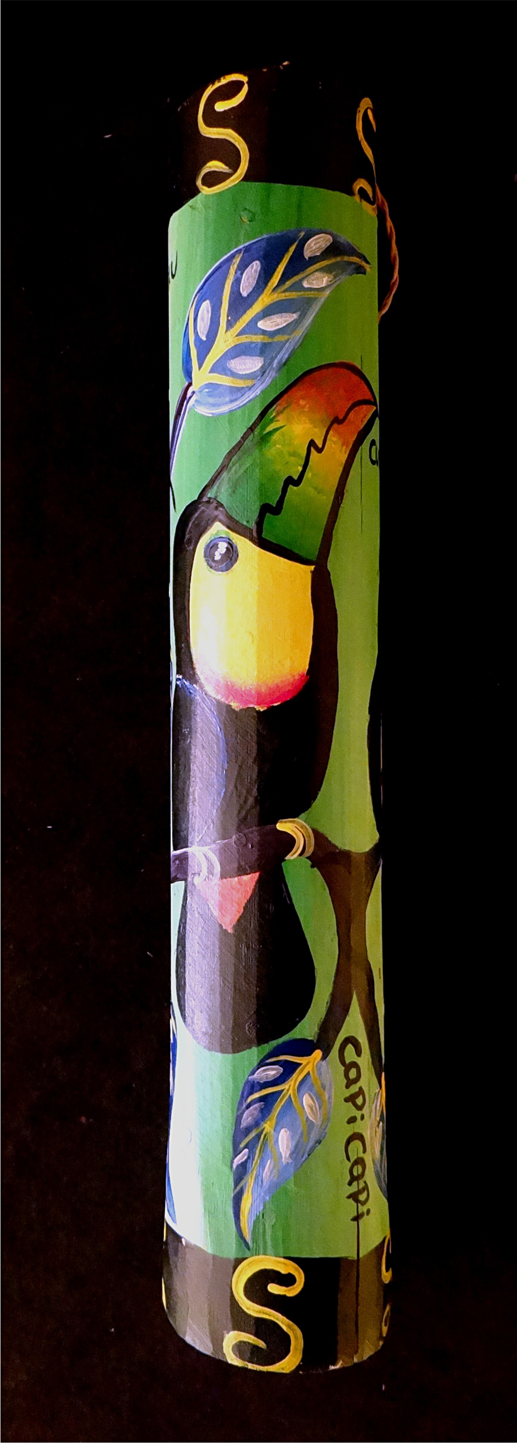 Bâton de pluie, artisanat Maleku, Palenque Tonjibe (village), région de Guatuso, Costa Rica.